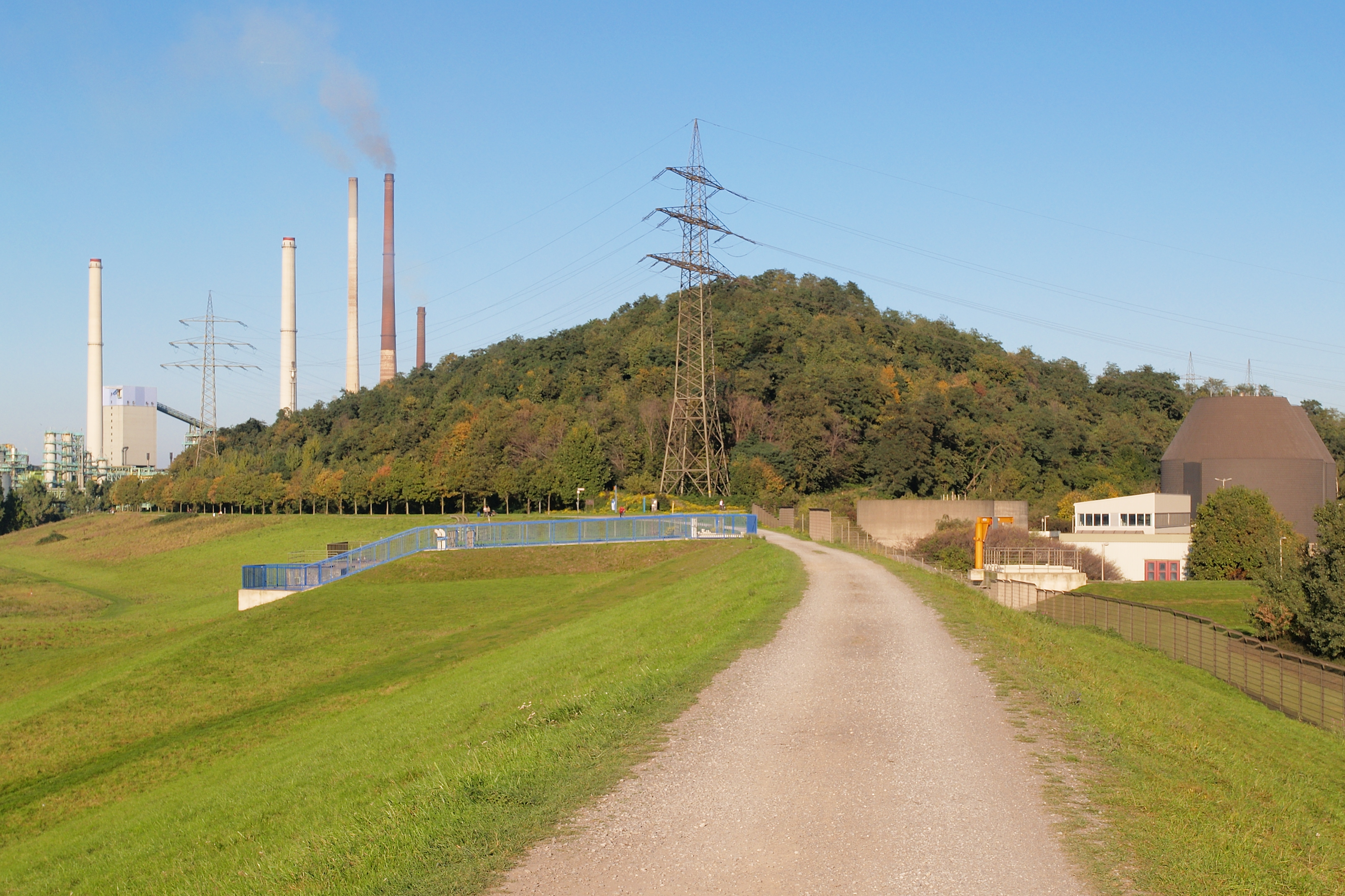 Der Alsumer Berg, eine begrünte Bergehalde und Bauschutt-Deponie in Duisburg Alsum, unmittelbar am Rheinufer gelegen; davor 220/110-kV-Freileitung (Bl. 2347).